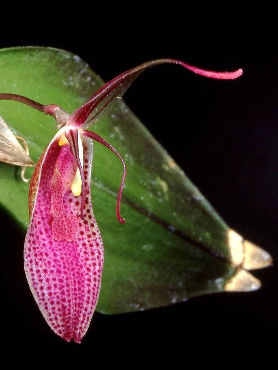 Restrepia pandurata - flower